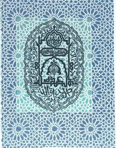 Incisione di Gabriele Mandel fotografata dall'originale (collezione privata Nazzareno Venturi)